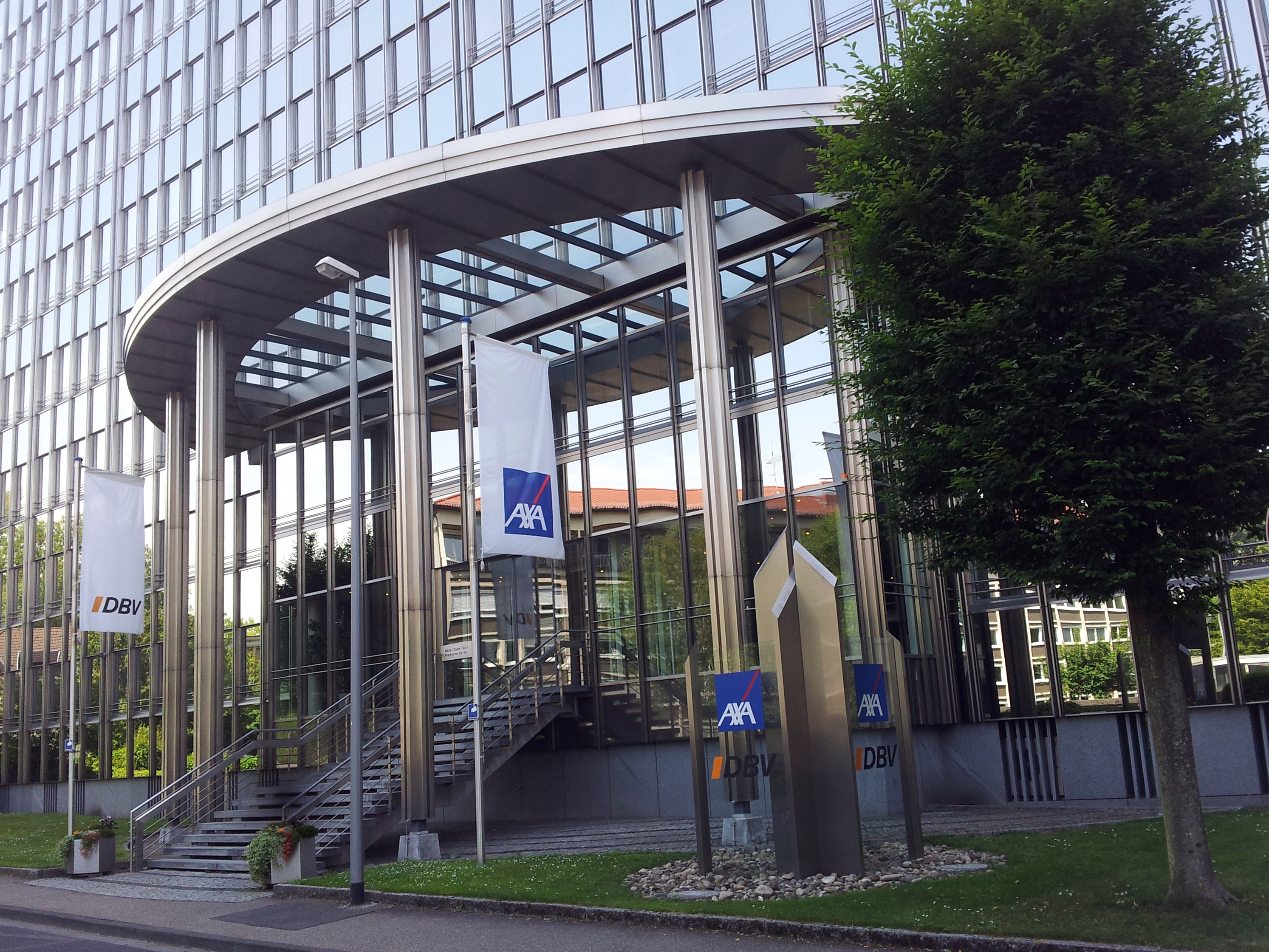 Gebäude der DBV-Axa in Wiesbaden, früher DBV-Winterthur